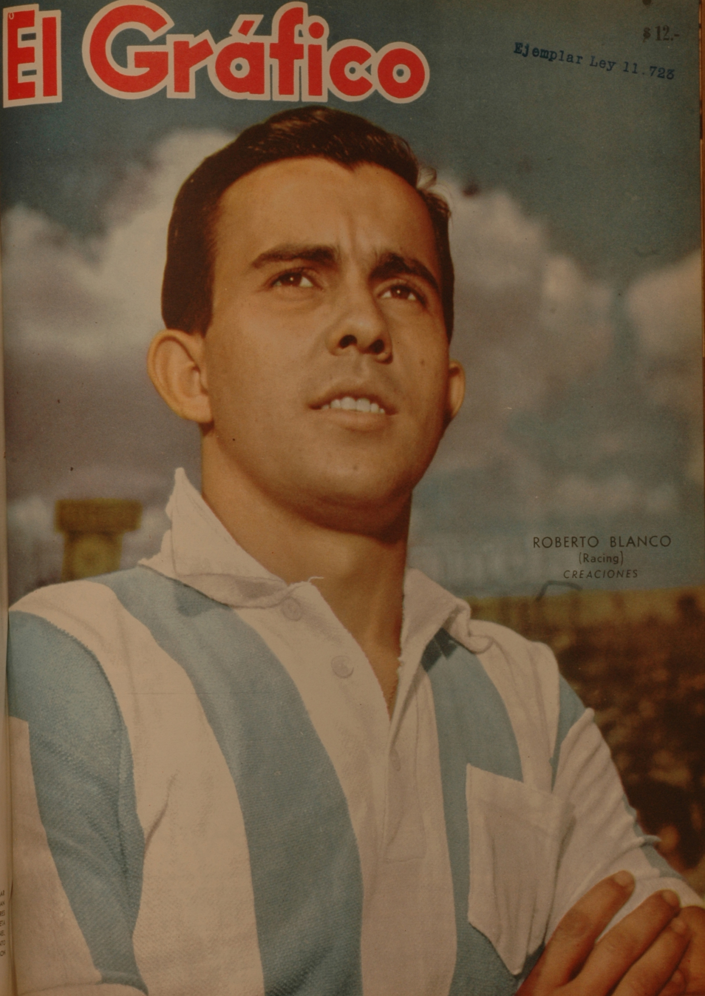 El Grafico del 24 de Mayo de 1961. Edicion 2173